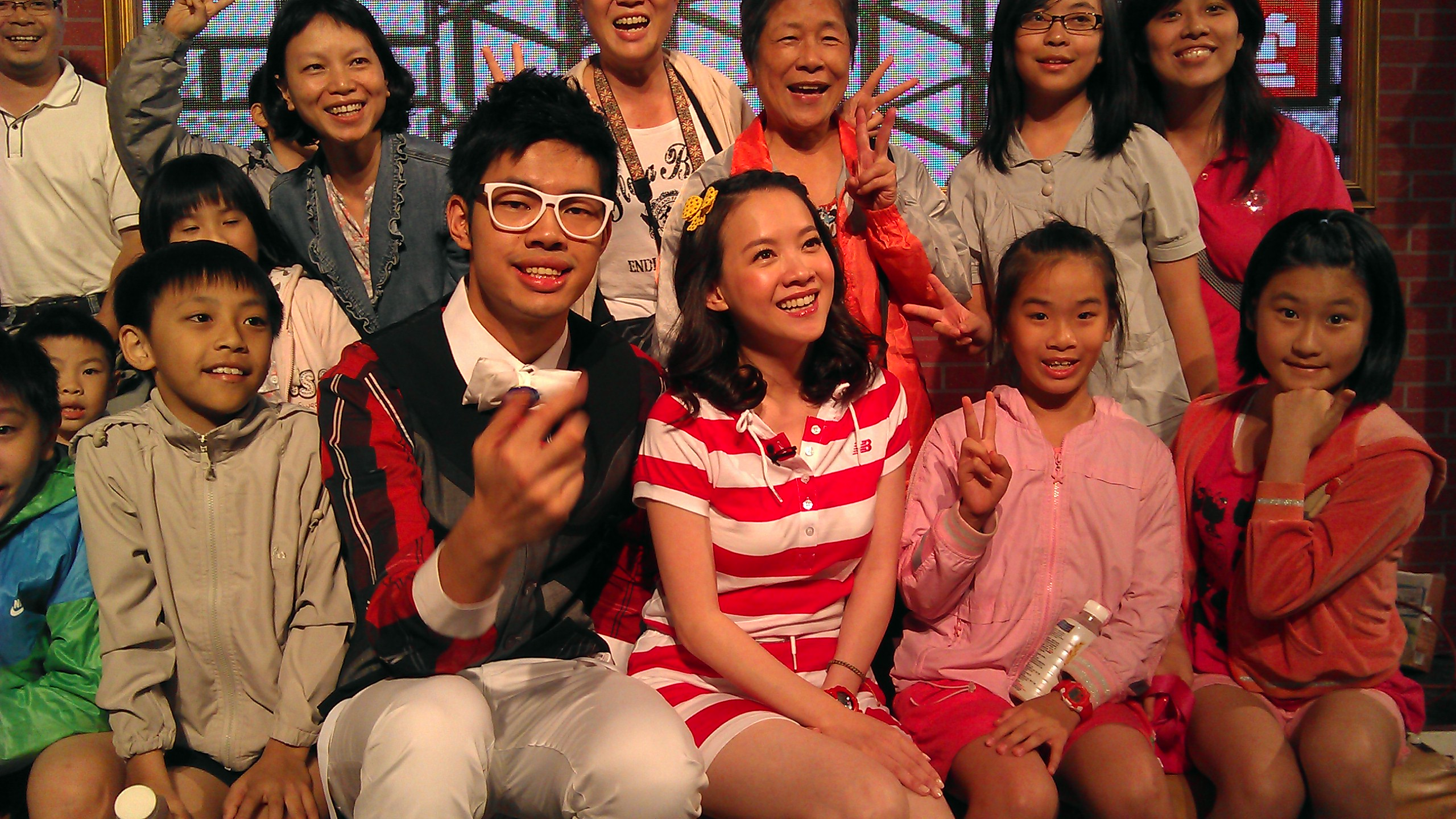 百萬小學堂節目主持人曾寶儀與小蝦共同與現場觀眾合影留念。